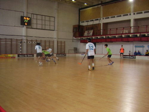 Floorball